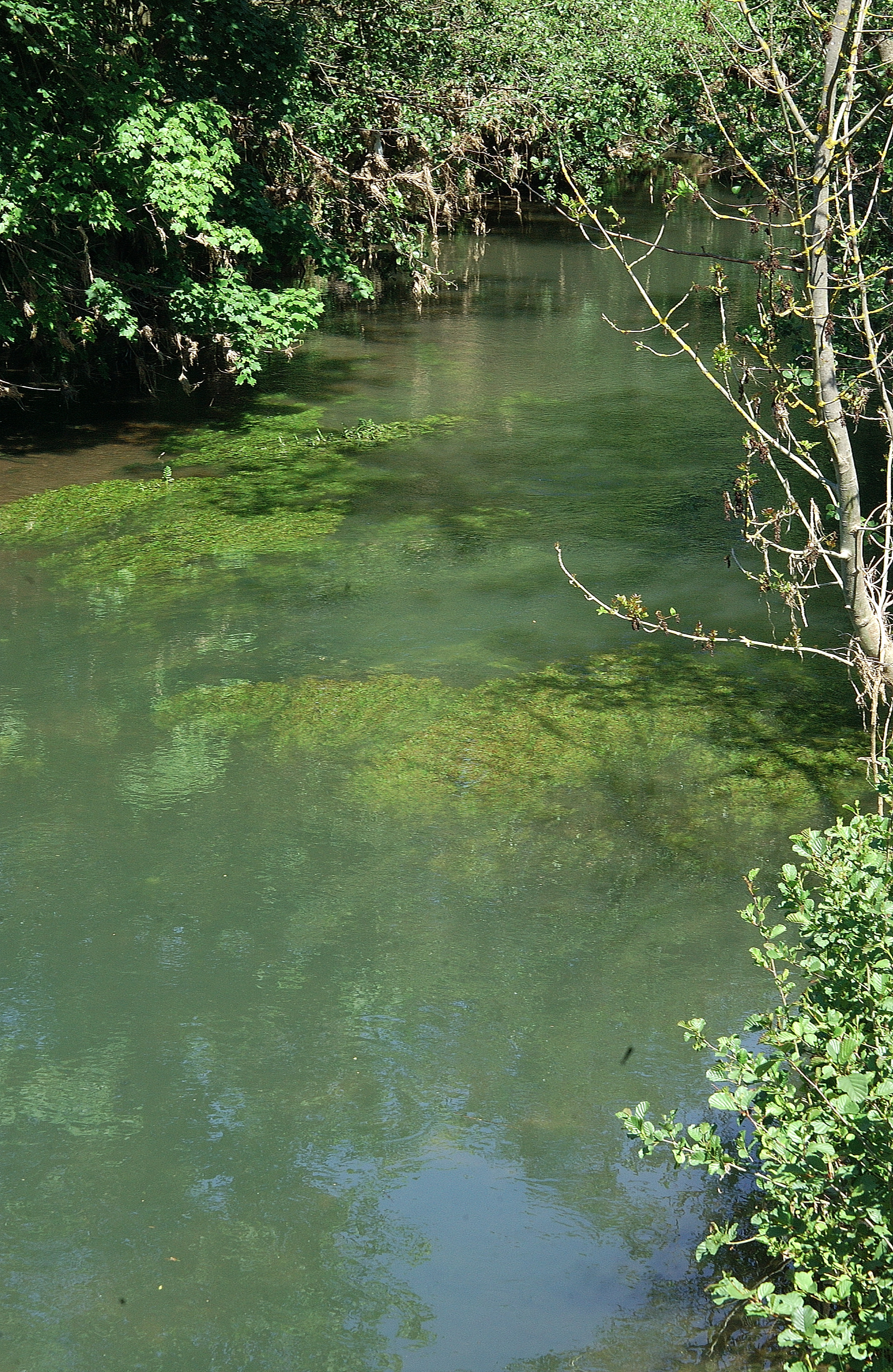 Lauer